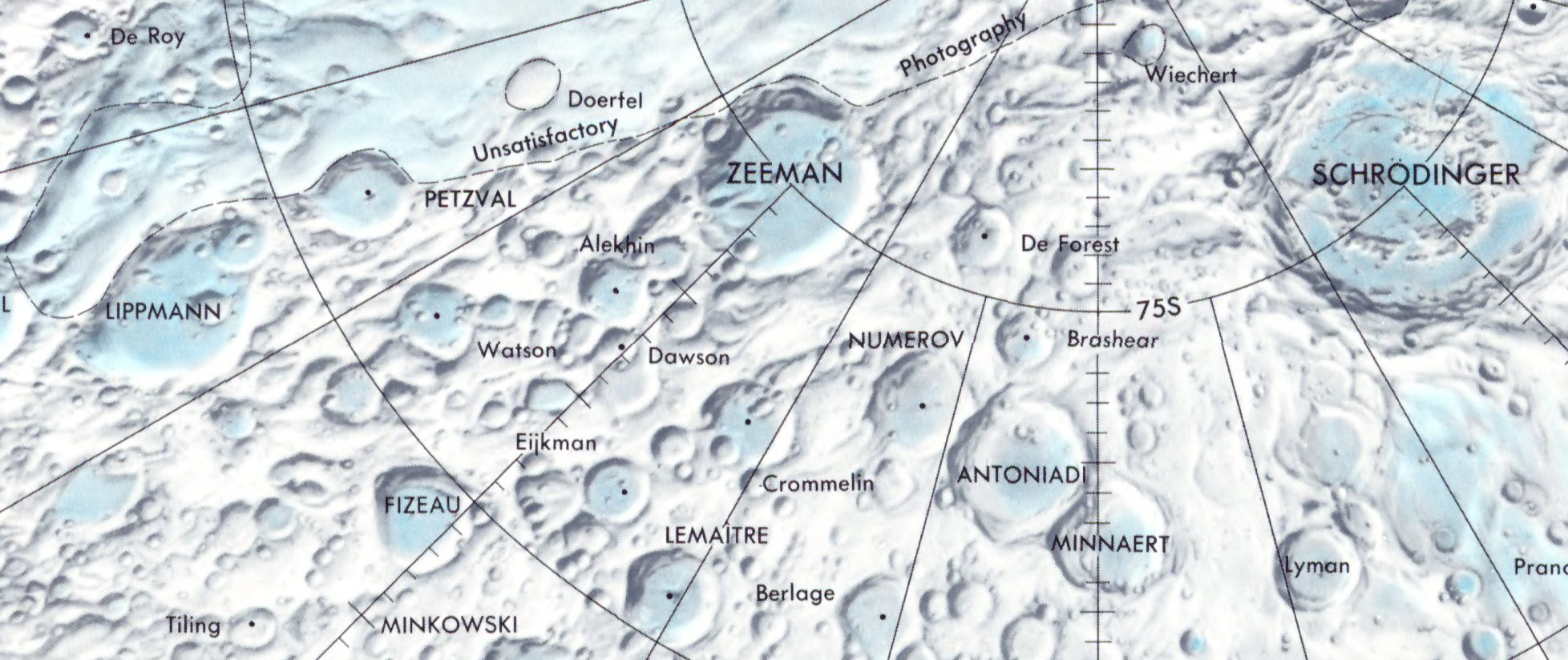 Cráter lunar Watson. Localización. (Lunar Chart LPC1. Second Edition)